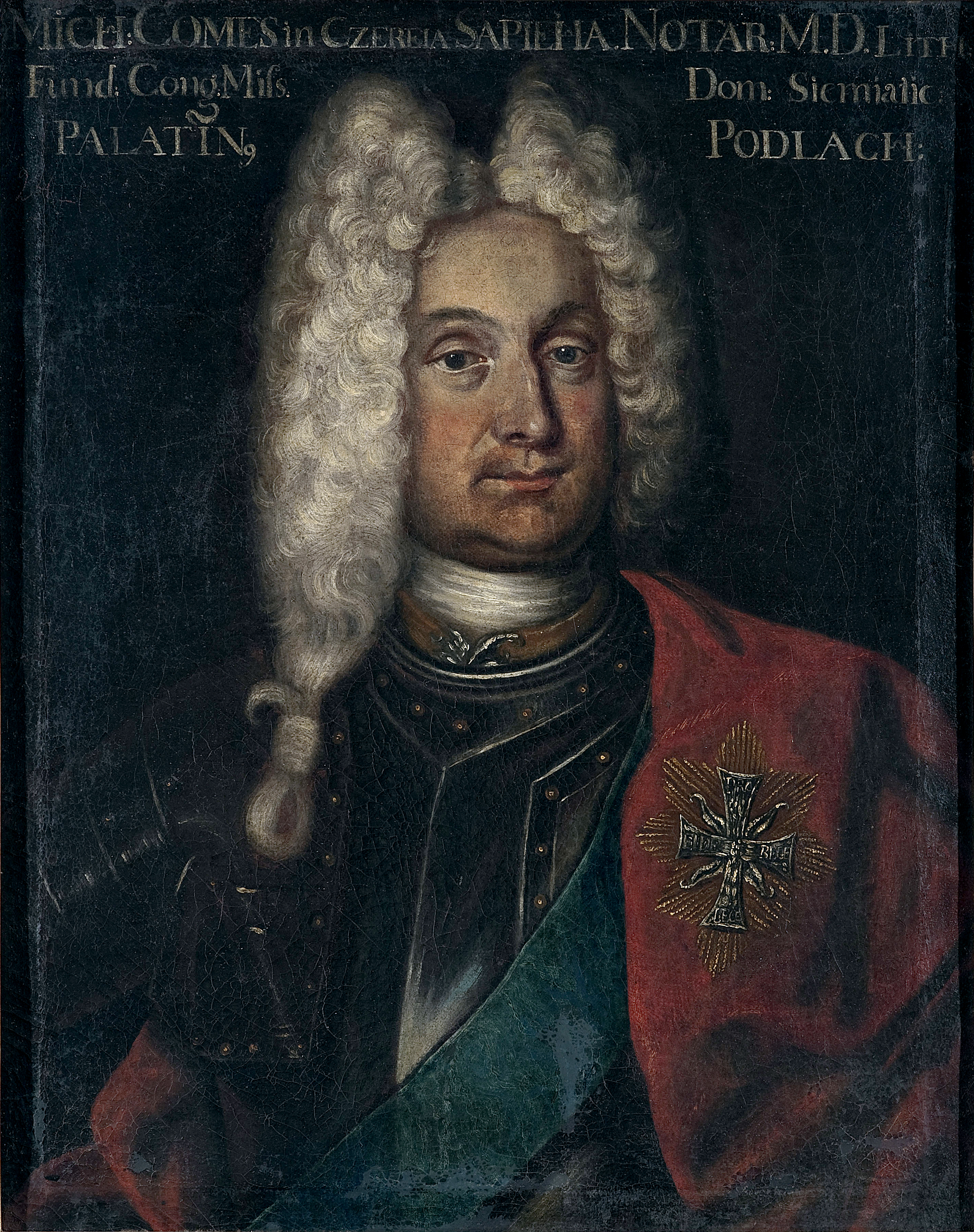 Беларуская (тарашкевіца): Партрэт Міхала Юзэфа Сапегі (Michał Juzef Sapieha) гербу «Ліс» (1670—1738), дзяржаўнага і вайсковага дзеяча Вялікага Княства Літоўскага, чашніка і стражніка вялікага літоўскага, пісара польнага літоўскага, ваяводы падляскага.